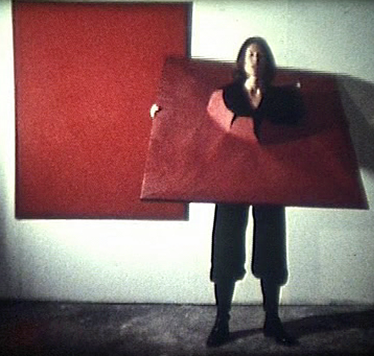 Das filmische Selbstporträt entstand im Berliner Atelier von Rainer Fetting.